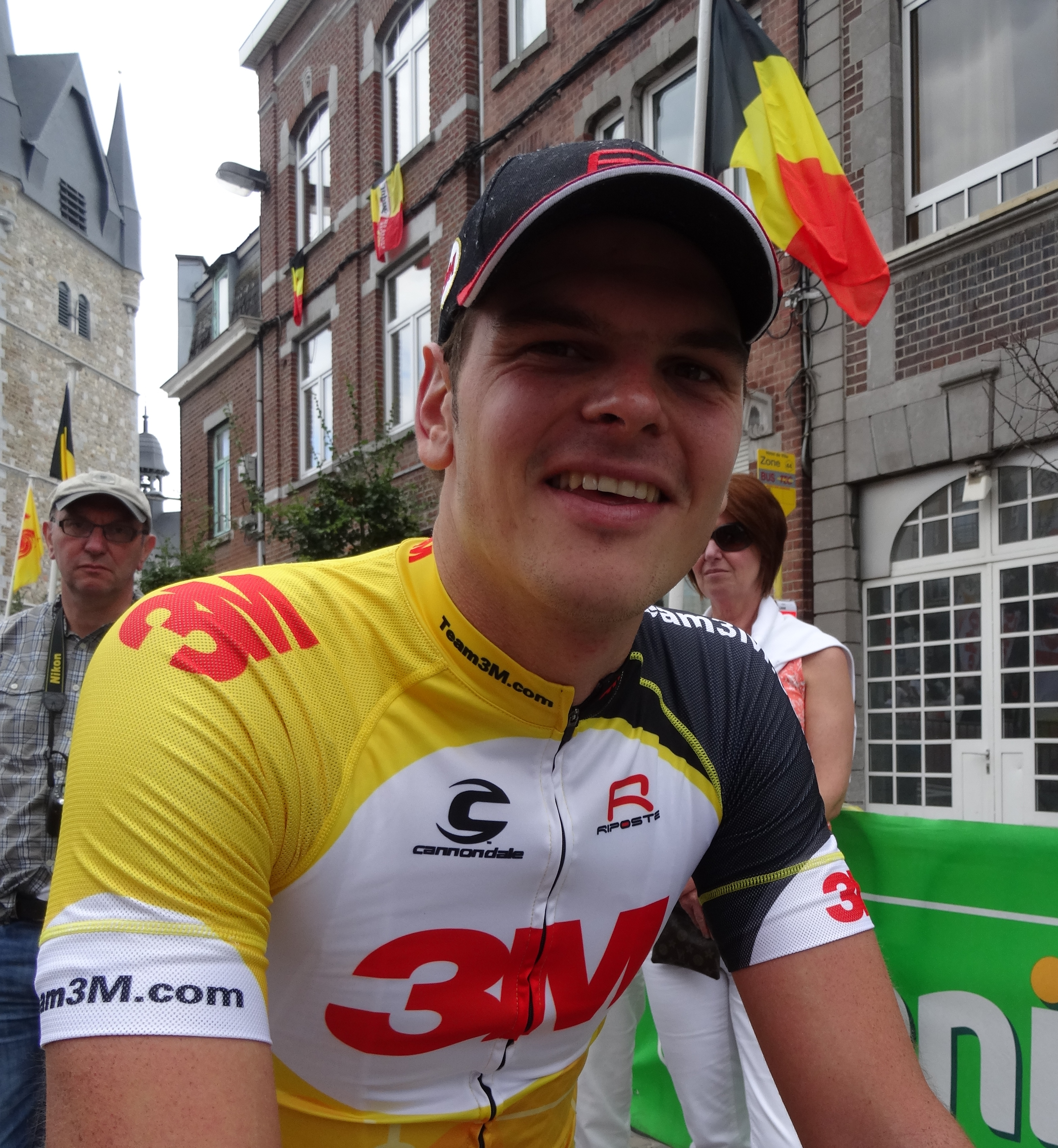 Reportage photographique réalisé le dimanche 22 juin à l'occasion du départ et de l'arrivée de la Flèche ardennaise 2014 à Herve, Belgique.